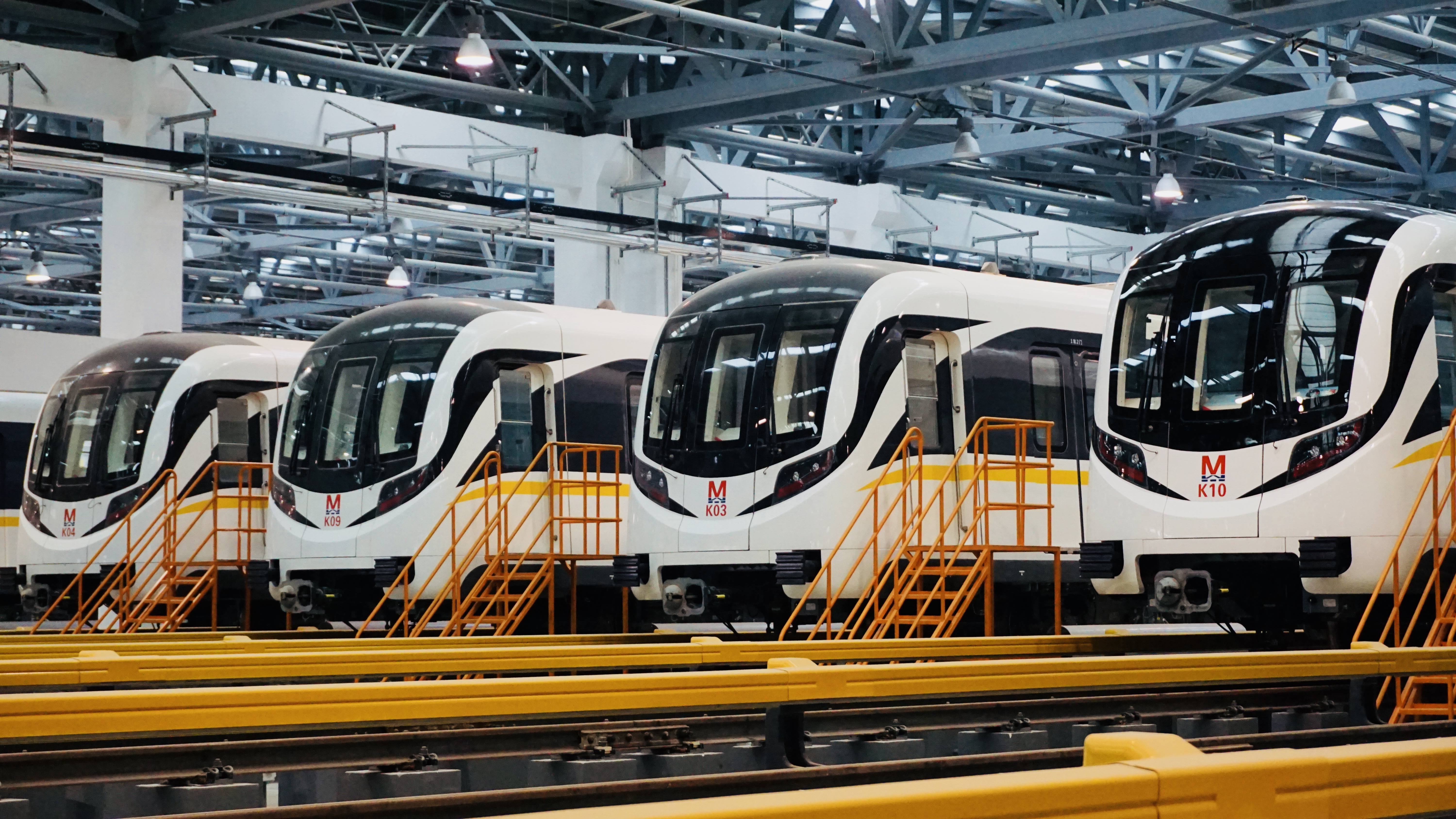 武汉轨道交通11号线车辆，摄于长岭山车辆段。